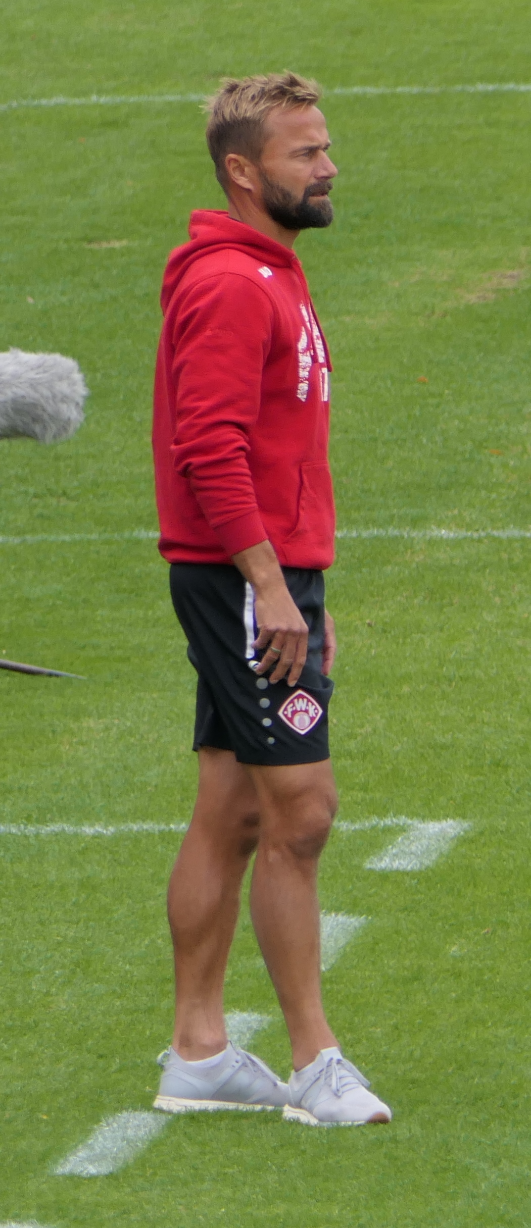 Der Fussballtrainer Michael Schiele als Trainer der Würzburger Kickers beim Heimspiel gegen Eintracht Braunschweig am 22.09.2018.